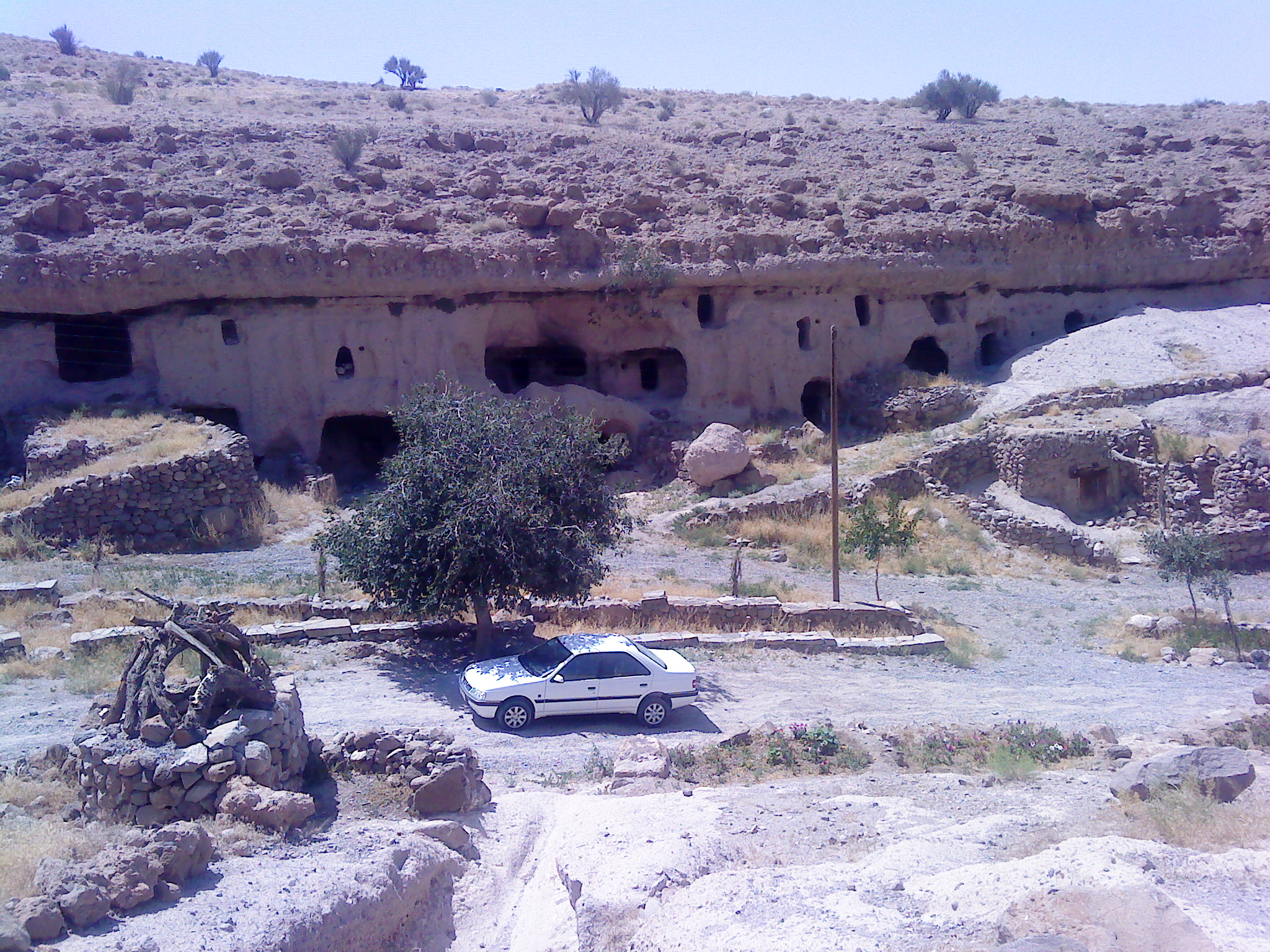 نگاره سراسر نما میمند